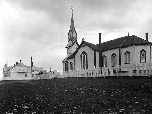 Gamle Vadsø kyrkje (1861-1944) Arkitekt: Chr. H. Grosch